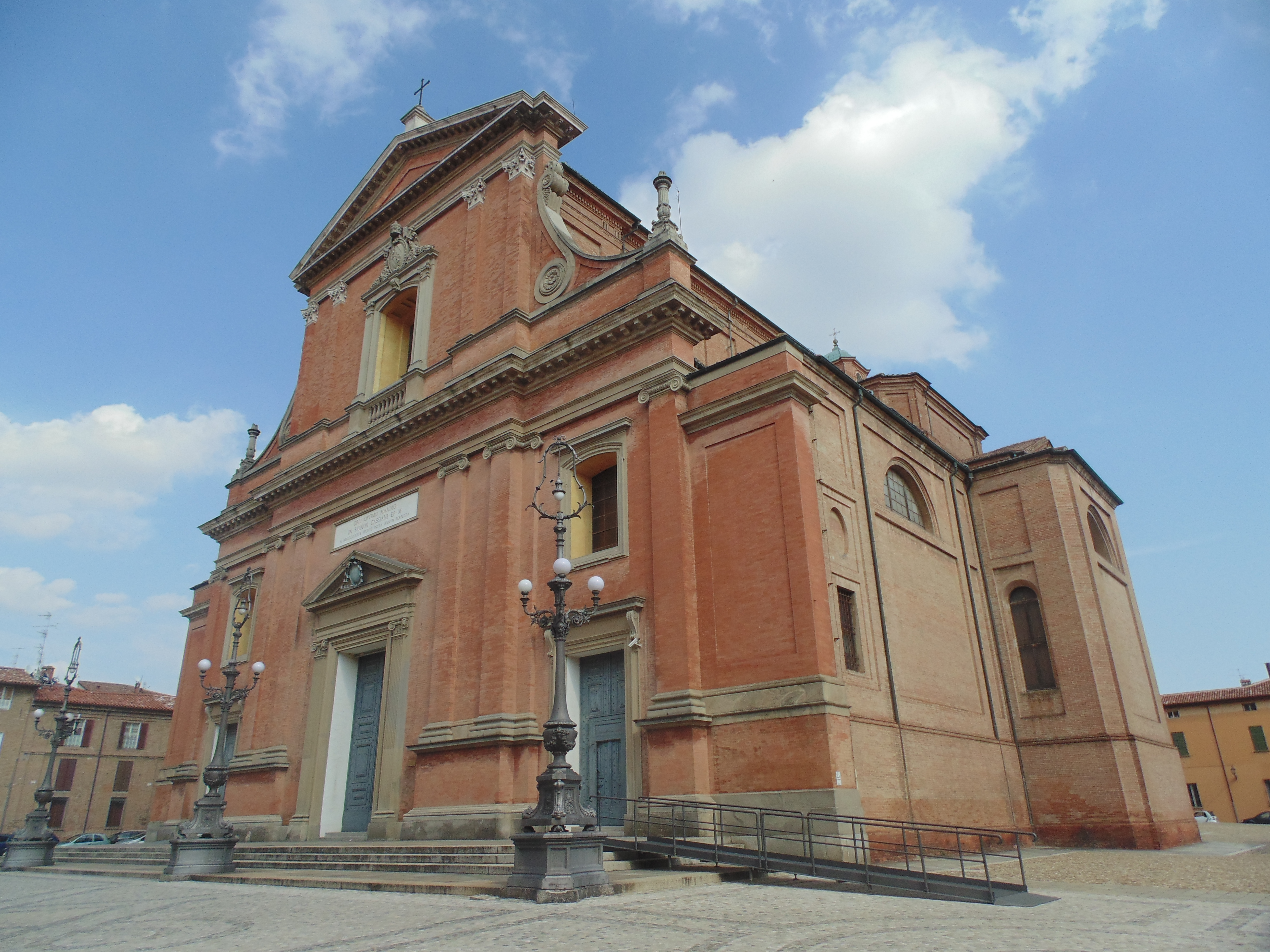 Chiesa cattedrale di San Cassiano - MIBAC This is a photo of a monument which is part of cultural heritage of Italy.